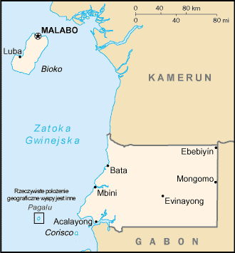 Mapa Gwinei Równikowej na podstawie CIA World Factbook